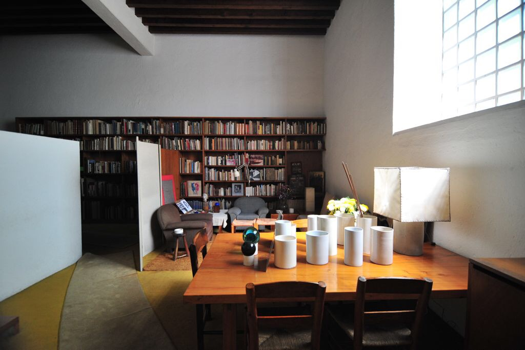 墨西哥建築師易斯巴拉干自宅 Casa Luis Barragan, Tacubaya, Mexico City